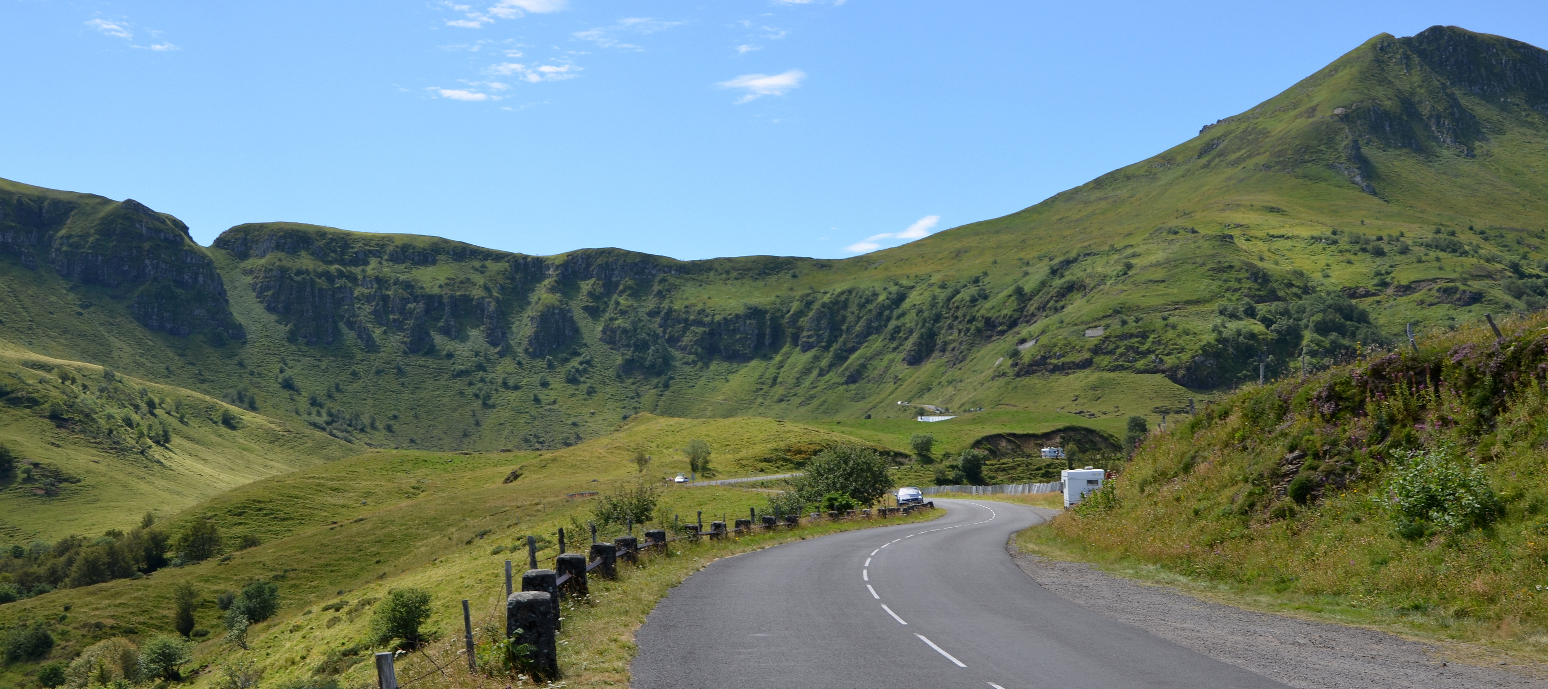 Fonds de vallée de l'Impradine brèche de Roland et Puy Mary, Cantal, France